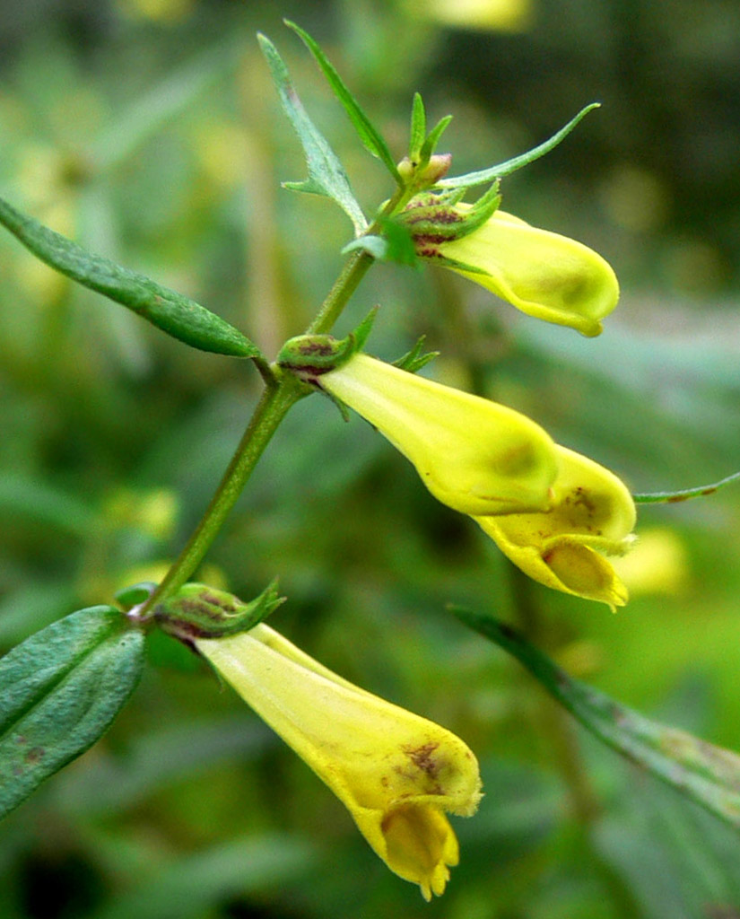 Mélampyre des prés (Melampyrum pratense, Scrophulariaceae ), hôte du papillon de jour Mélitée du mélampyre, ici en zone claire de la «Forêt domaniale de Fossard», Vosges (milieu acide), France